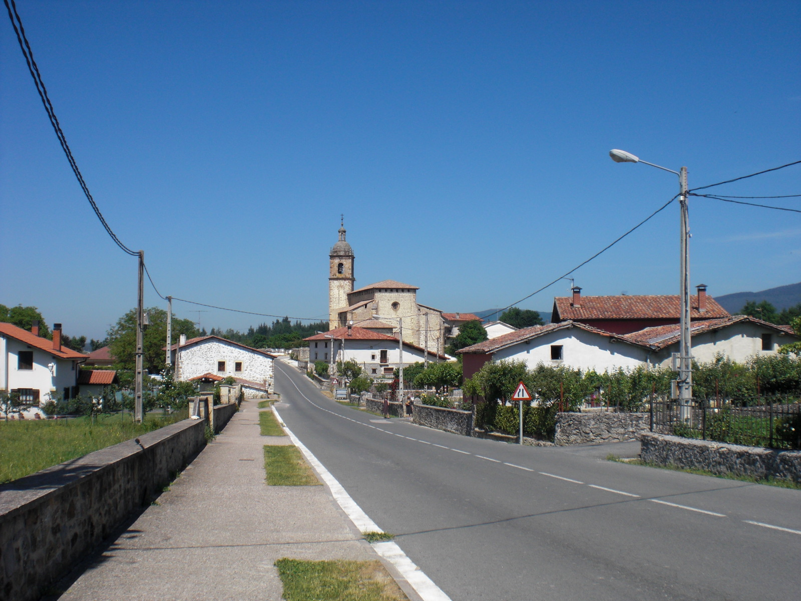 Barrundiako Larrearen ikuspegia